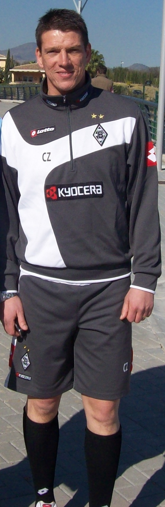 Christian Ziege